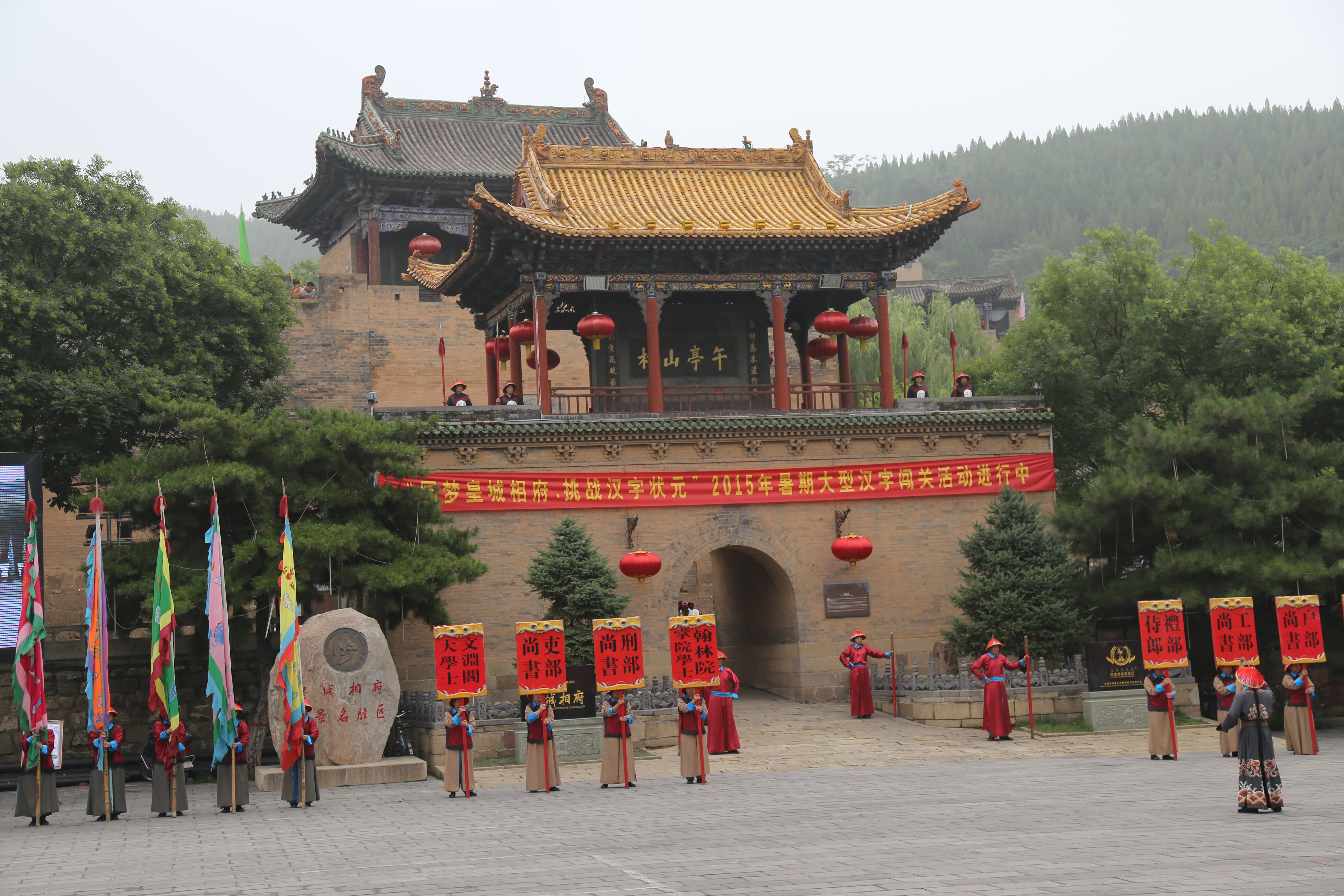 晋城皇城相府风光